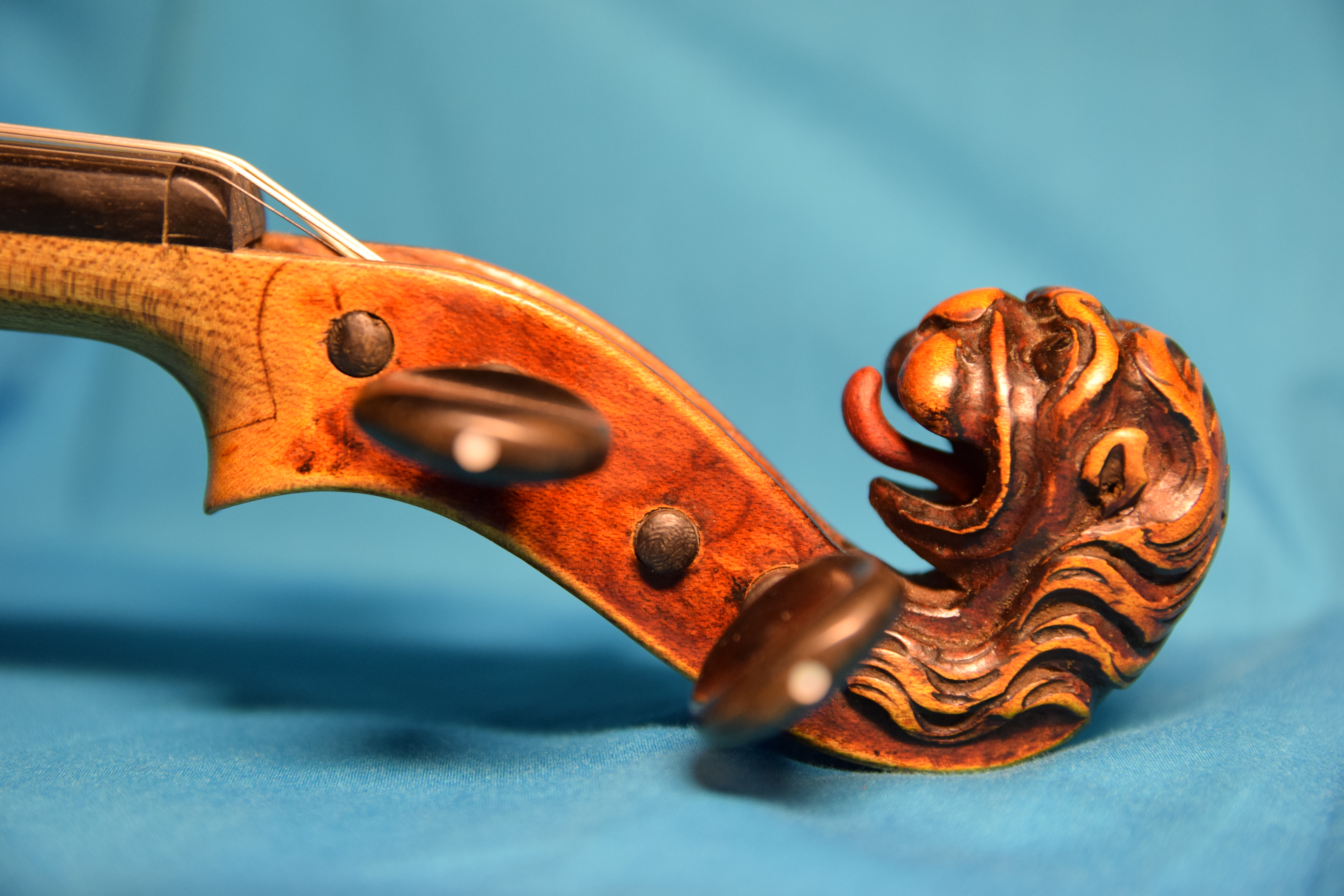 Nl.: Typerende versierde krul van een kopie van een Stainer viool